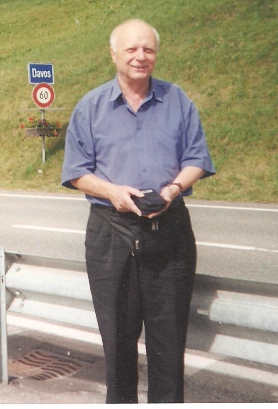 Romuald Gomerski w Davos